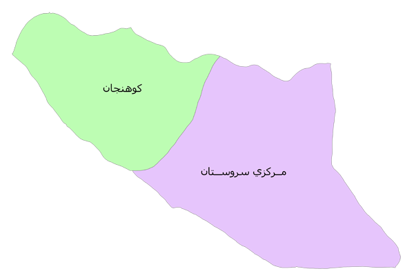 بخش کوهنجان